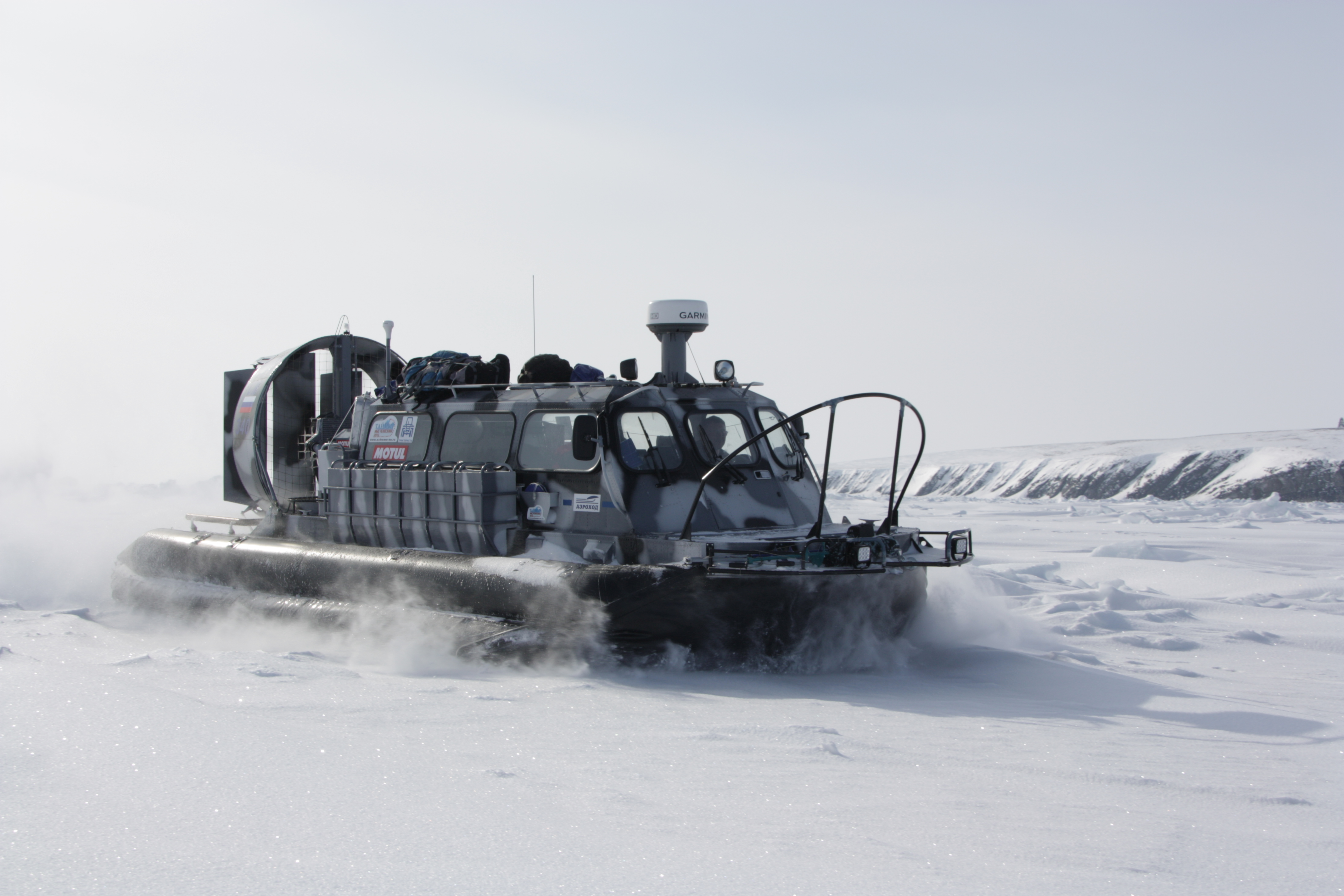 Экспедиция на Таймыре в апреле 2013 года